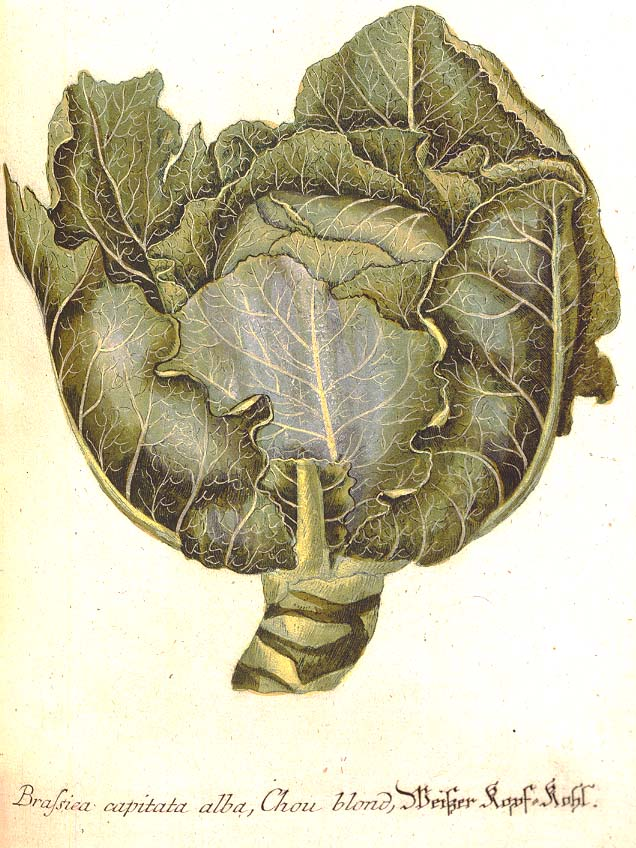 "Brassica capitata alba"